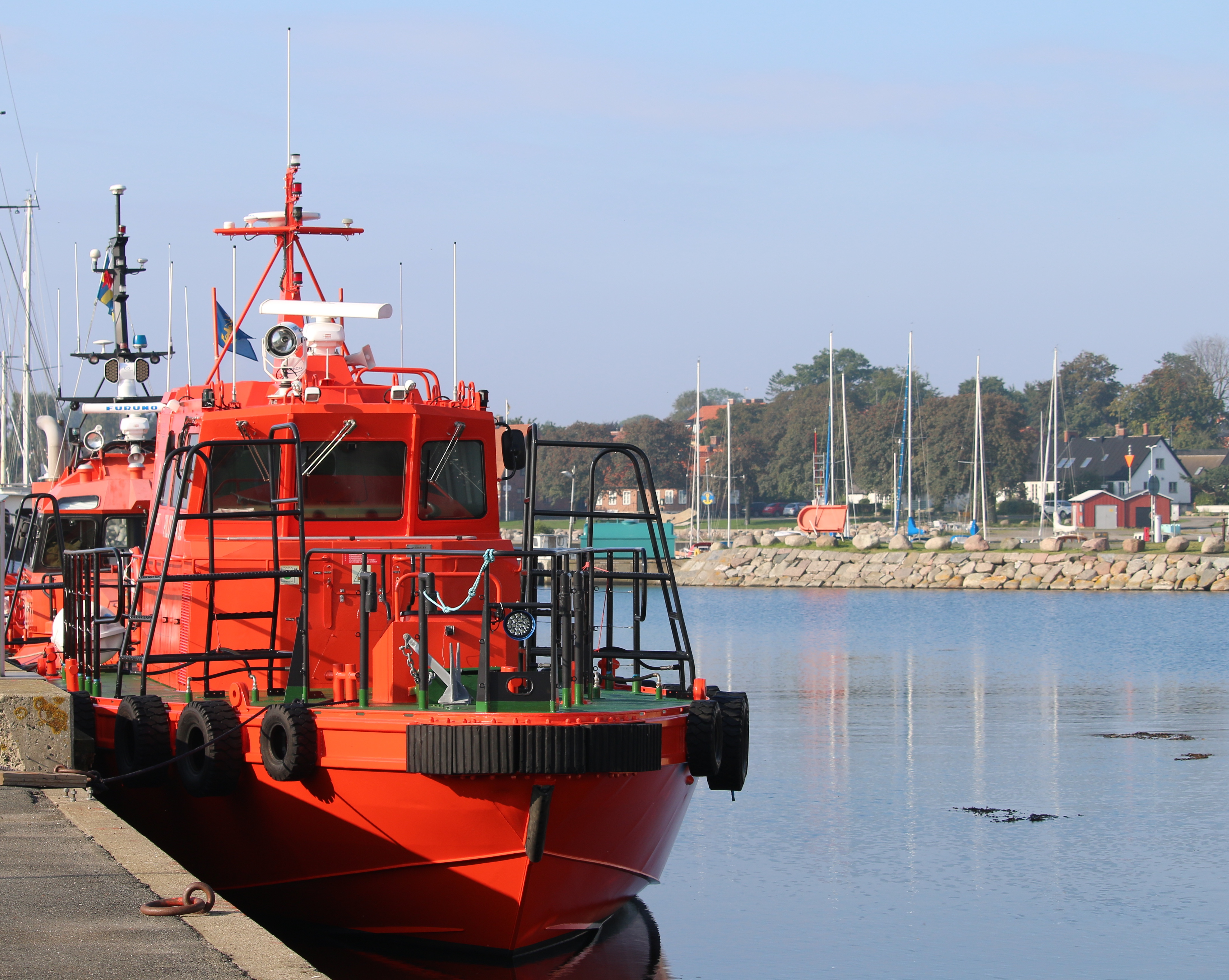 Pilot 214 SE i Skillinge 2017